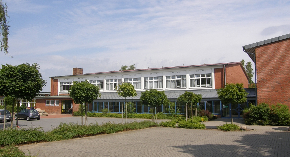 Die Schule in Lamstedt